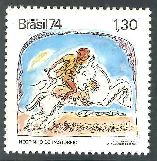 Emissão comemorativa dos Correios, realizada em Fevereiro de 1974, para divulgação das Lendas Brasileiras